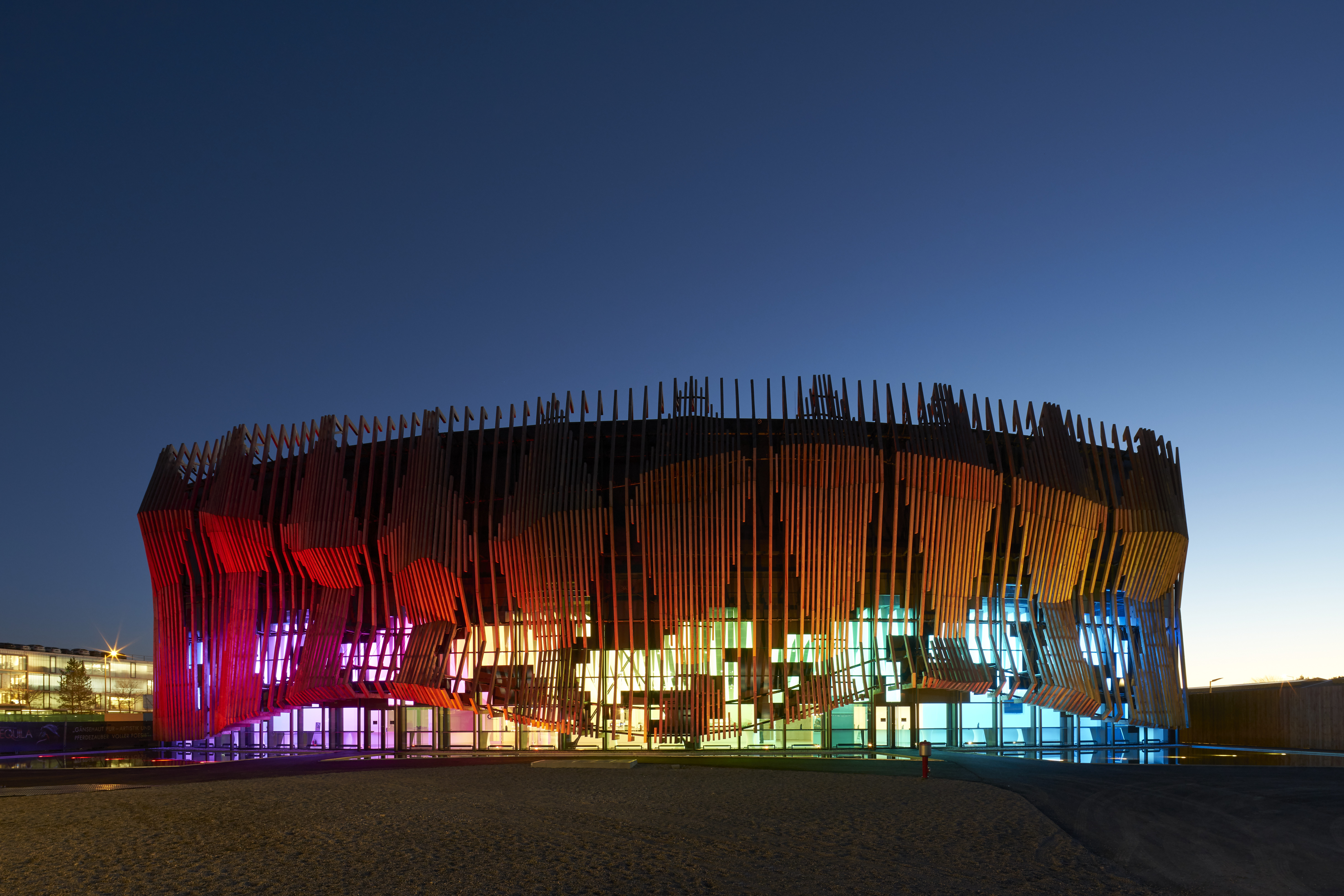 001_EQUILA_SHOWPALAST MÜNCHEN